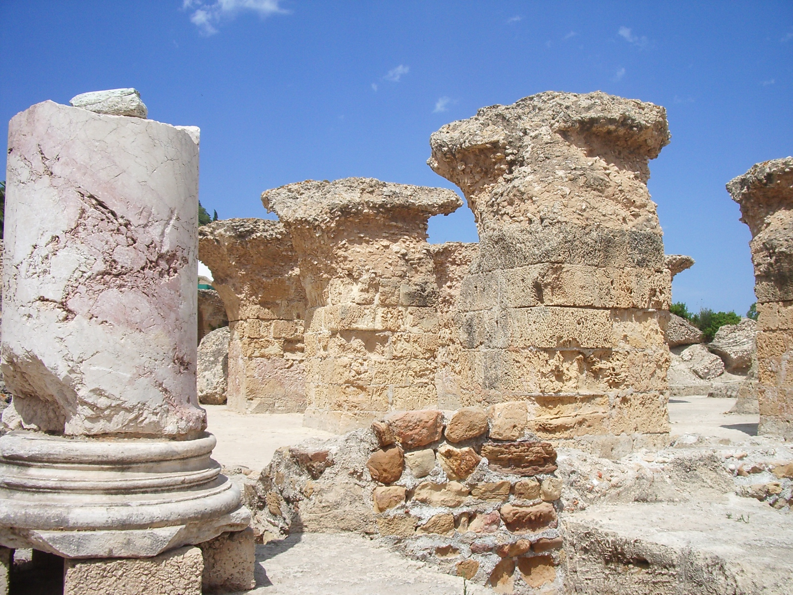 ruines de les termes d'Antoní